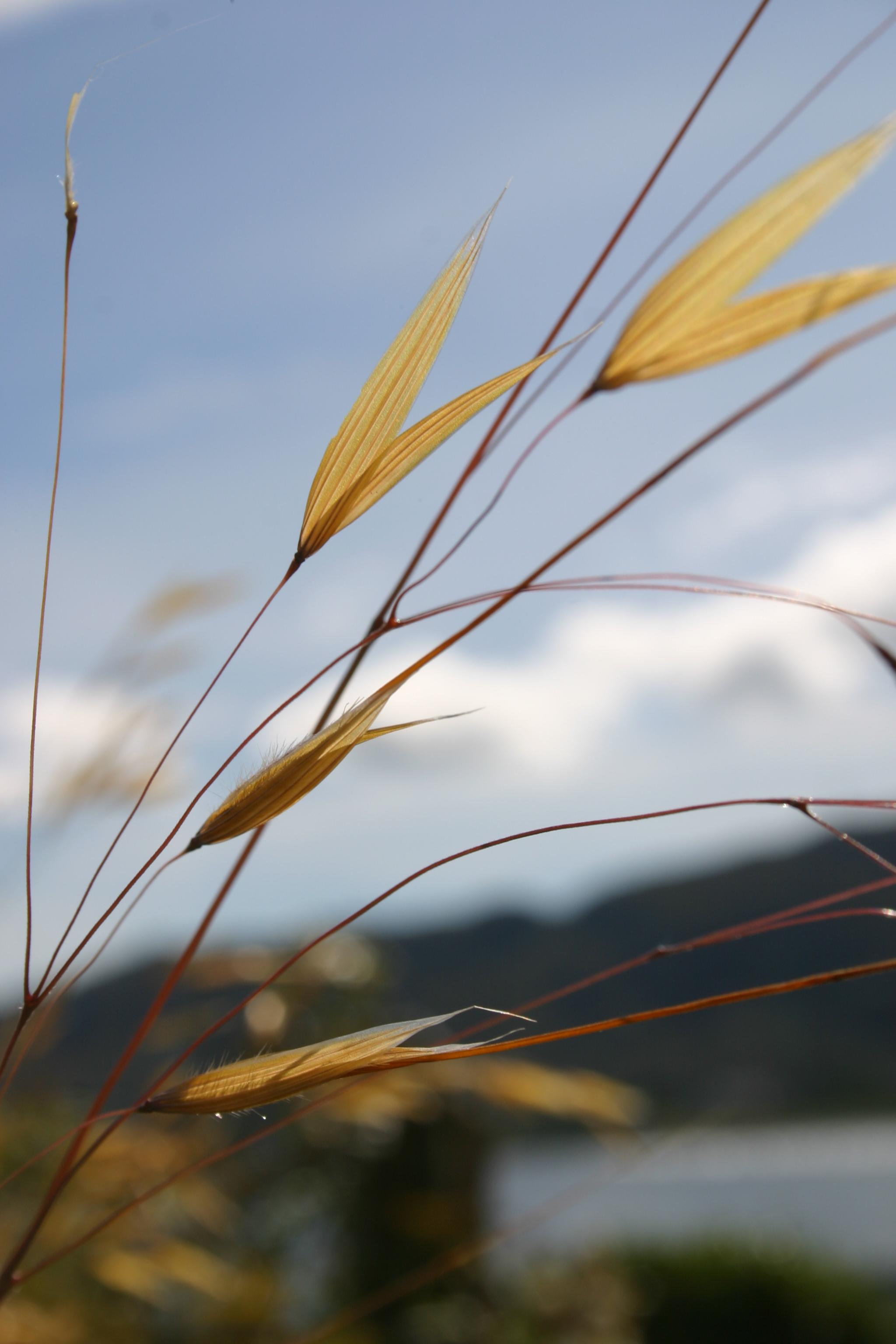 Gras in Schottland, Spelzen